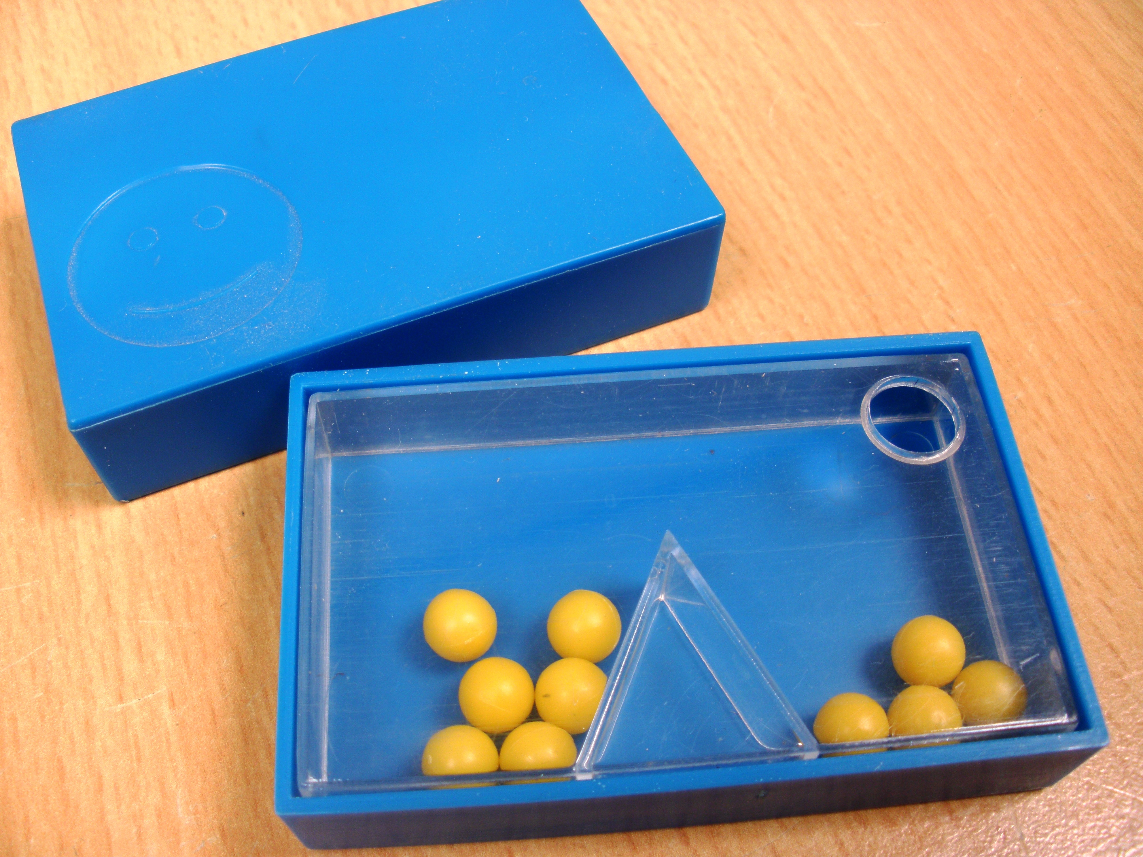 Splitsdoosje als hulpmiddel bij het leren rekenen. Hiermee kan het getal 10 worden gesplitst in bijvoorbeeld 6 en 4. Het doosje wordt dichtgedaan, geschud en daarna wordt één kant getoond. Hoeveel kralen zitten er aan de andere (onzichtbare) kant?